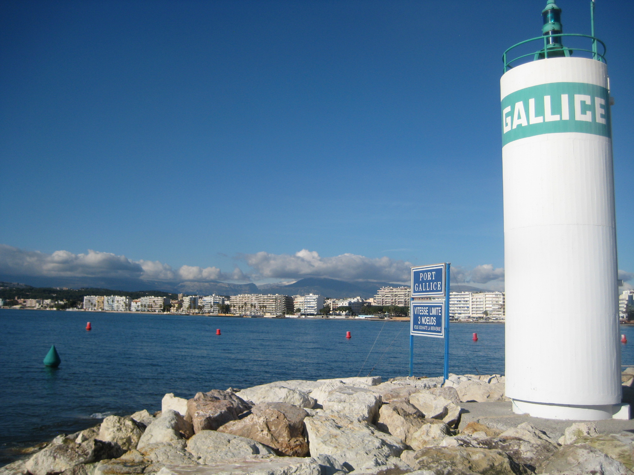 Description entrée port Gallice Juan Date21 October 2011Sourcemon appareil photoAuthorAimelaimePermission (Reusing this file) entrée port Gallice Juan